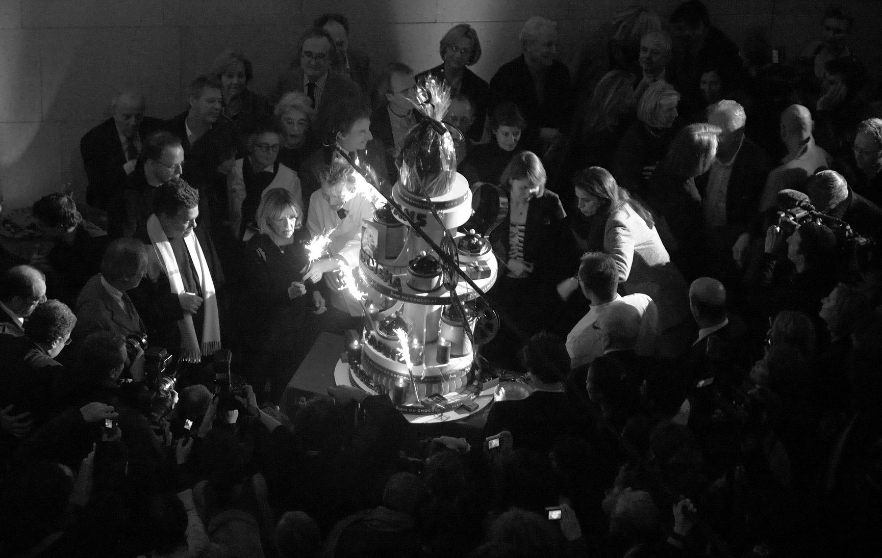 Jeanne Moreau à la Cinémathèque française pour ses soixante ans de cinéma le 6 février 2008